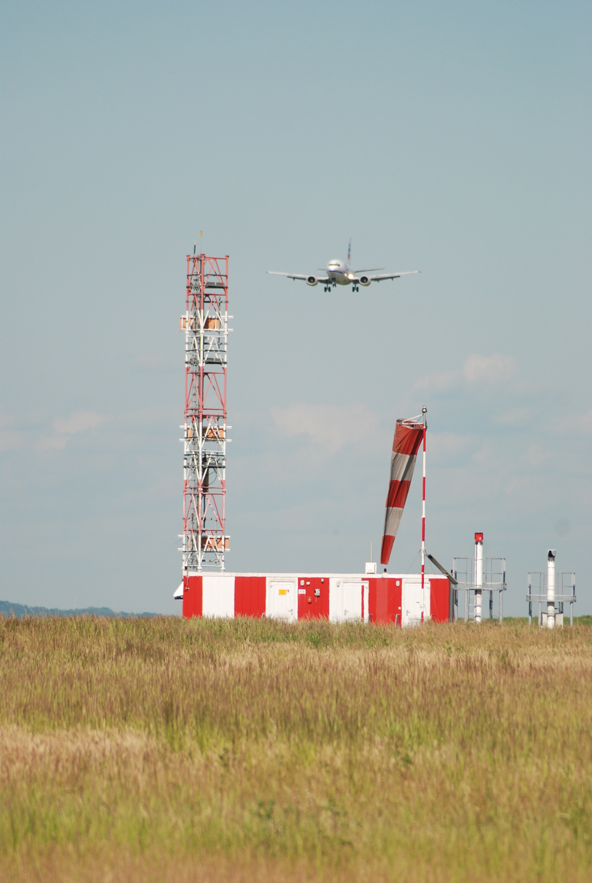 ILS_avion_IESSA